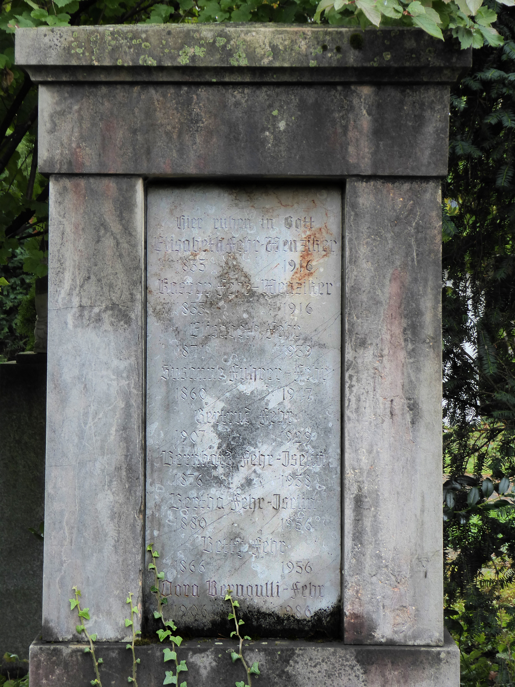 Bernhard Fehr-Iselin (1876–1938) Anglist, Professor. Grab auf dem Friedhof Wolfgottesacker, Basel